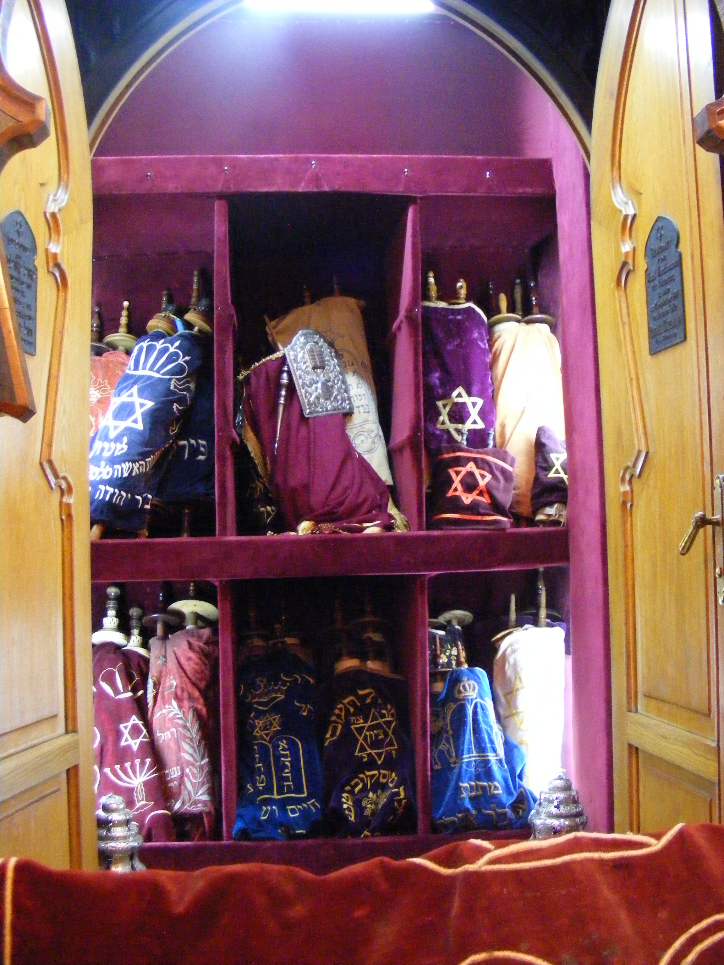 Toras in Istanbul Ashkenazi Sinagogue